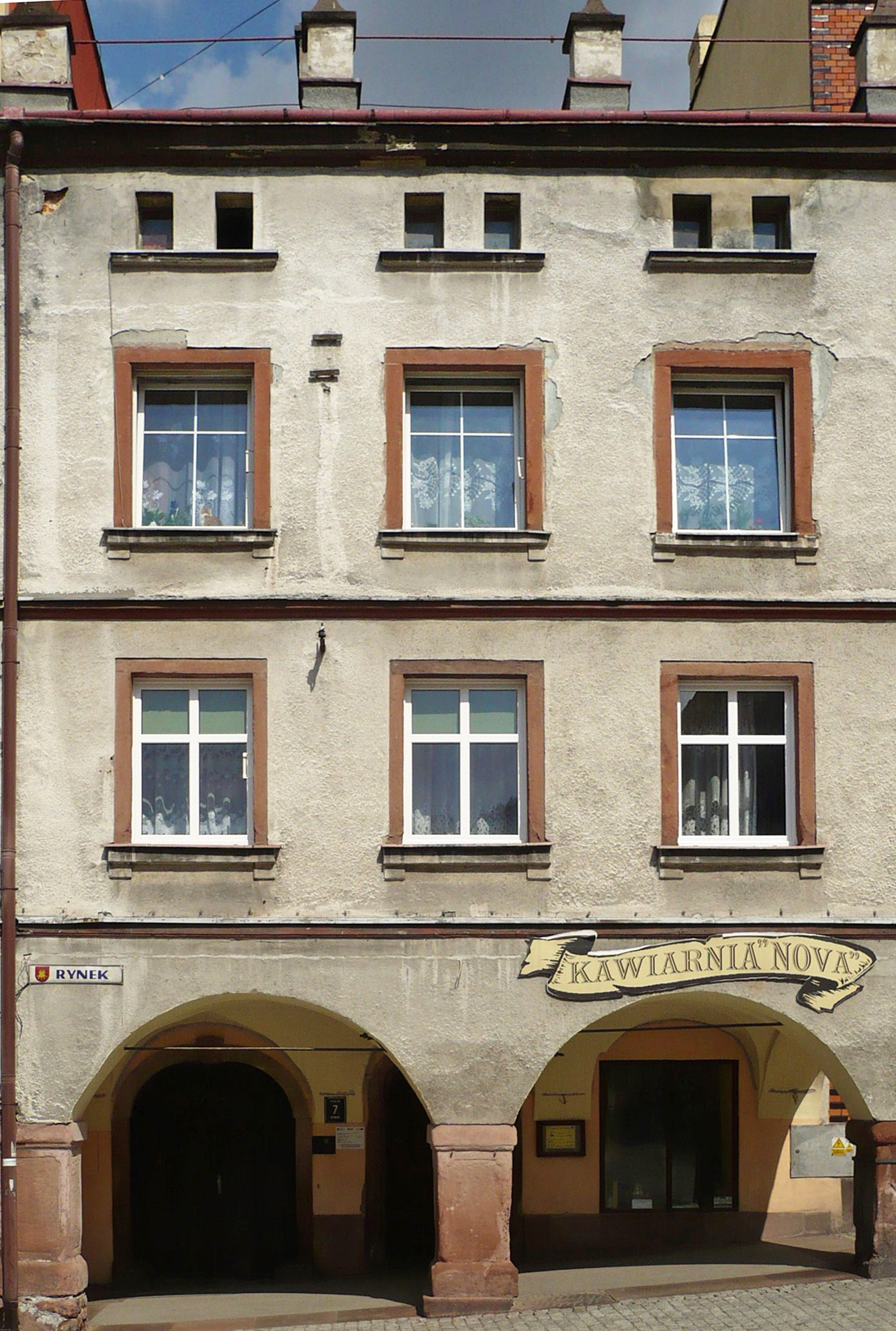 Nowa Ruda, Rynek 7 - kamienica, XVI/XVII, XVIII, 1884 (zabytek nr A/1176 z 31.03.2009)